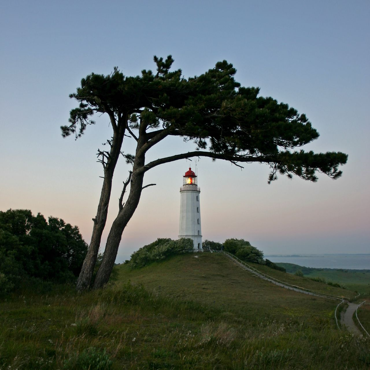 Leuchtturm auf Hiddensee.